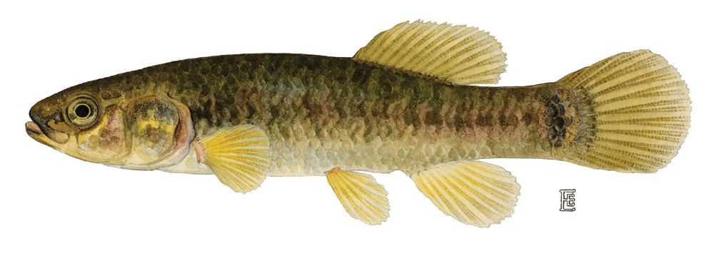 Central mudminnow (Umbra limi)